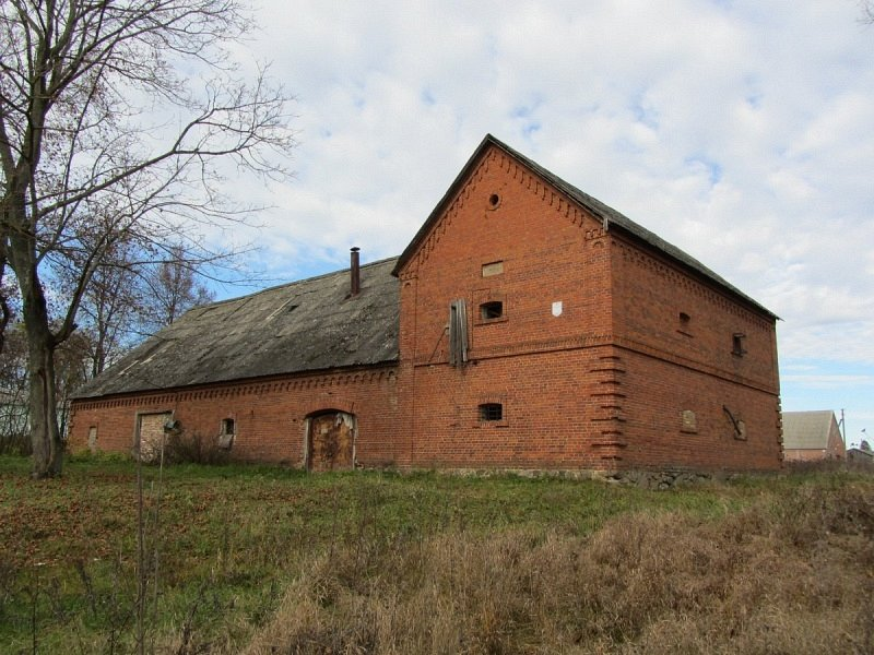 Туча. Кузня